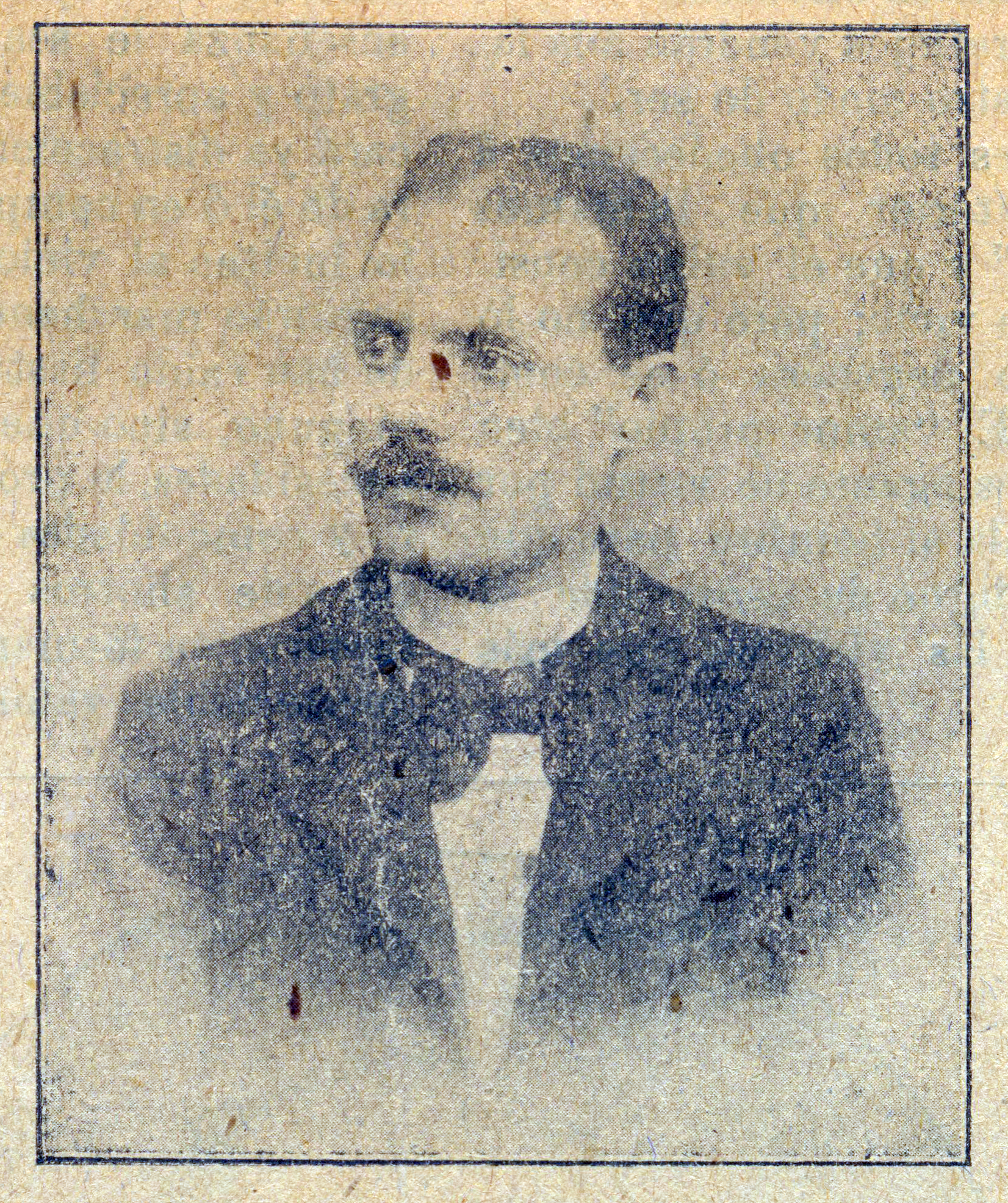 Foto de Luis Gonzaga Jordá i Rossell (Les Masies de Roda, 16 de junio de 1869 — Barcelona, 20 de septiembre de 1951). Circa 1902.